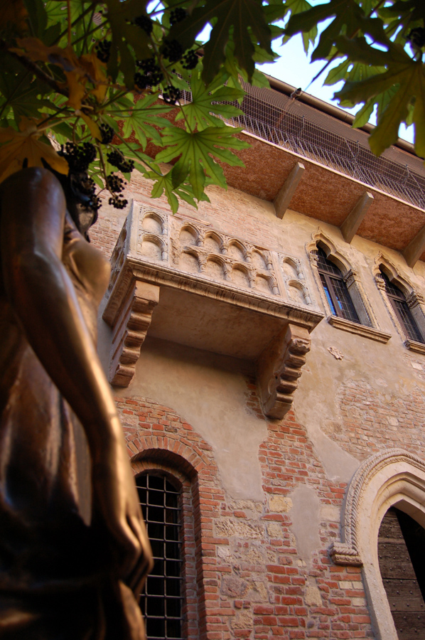 Fotografia del balcone di Giulietta a Verona